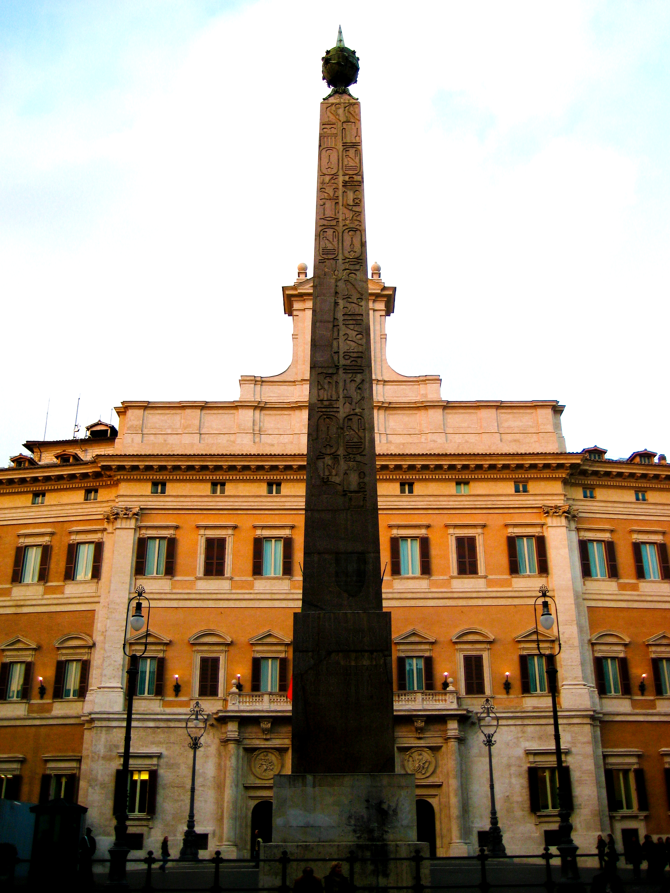 Obelisco Solare di fronte a Palazzo Montecitorio, Roma